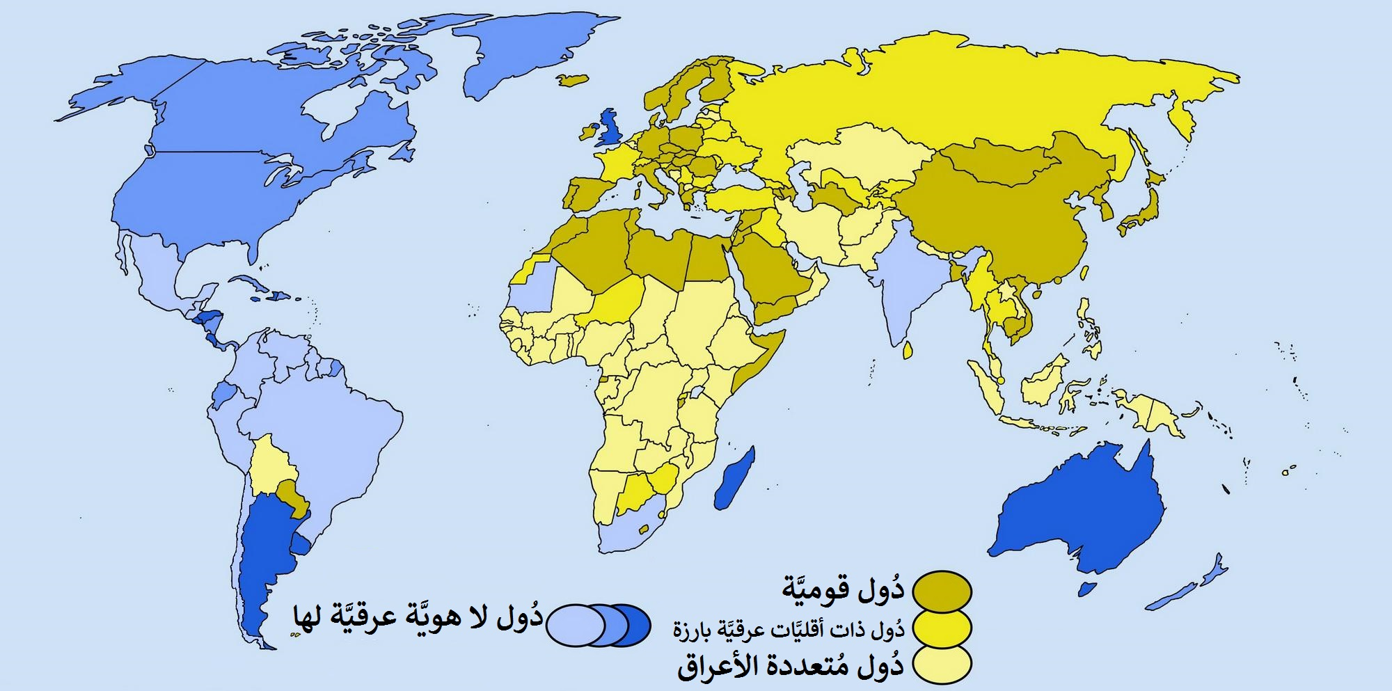 خريطة تُبيِّن أكبر المجموعات العرقيَّة كنسبة من إجمالي السُكَّان: الأصفر الداكن: 85% أو أكثر ينتمون إلى العرق الطاغي في البلاد الأصفر: مابين 65 و84% ينتمون إلى العرق الطاغي في البلاد الأصفر الباهت: 64% أو أقل ينتمون إلى العرق الطاغي في البلاد الأزرق الداكن: 85% أو أكثر ينتمون إلى العرق الطاغي في البلاد الأزرق: ما بين 65 و84% ينتمون إلى العرق الطاغي في البلاد الأزرق الباهت: 64% أو أقل ينتمون إلى العرق الطاغي في البلاد